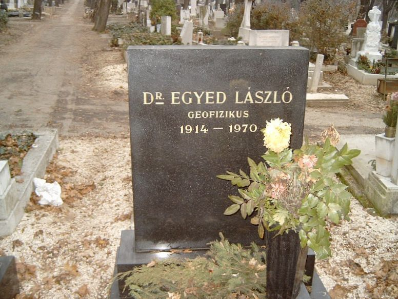 Egyed László (Fogaras, 1914. február 12. – Budapest, 1970. július 11.) geofizikus, egyetemi tanár, az MTA tagja sírja Budapesten. Farkasréti temető: 6/1-1-33